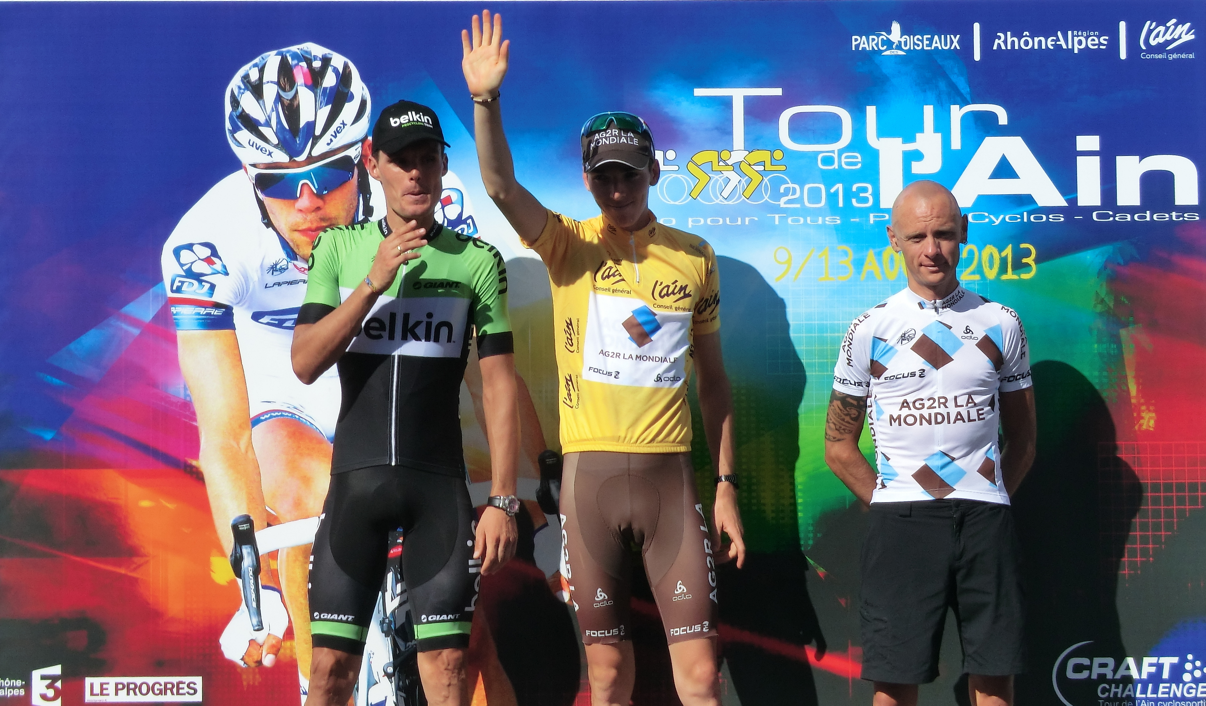 Podiums du Tour de l'Ain 2013, à l'issue de la dernière étape à Belley.